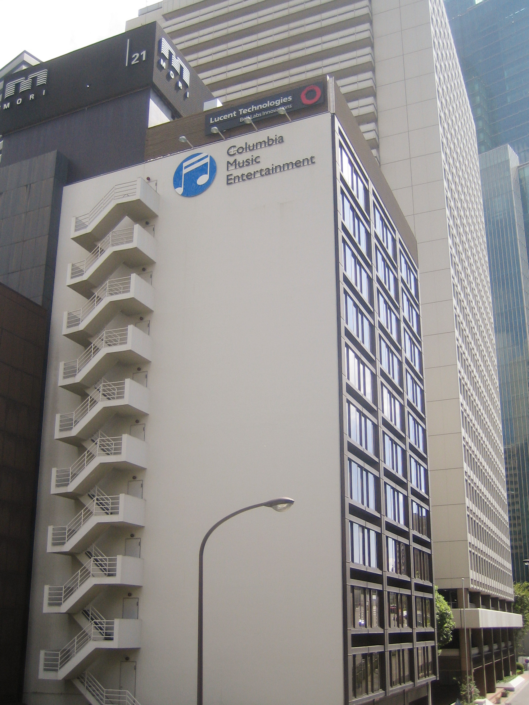 コロムビアミュージックエンタテインメント本社。東京都港区六本木 Columbia Music Entertainment (コロムビアミュージックエンタテインメント) , at Roppongi, Minato, Tokyo, Japan